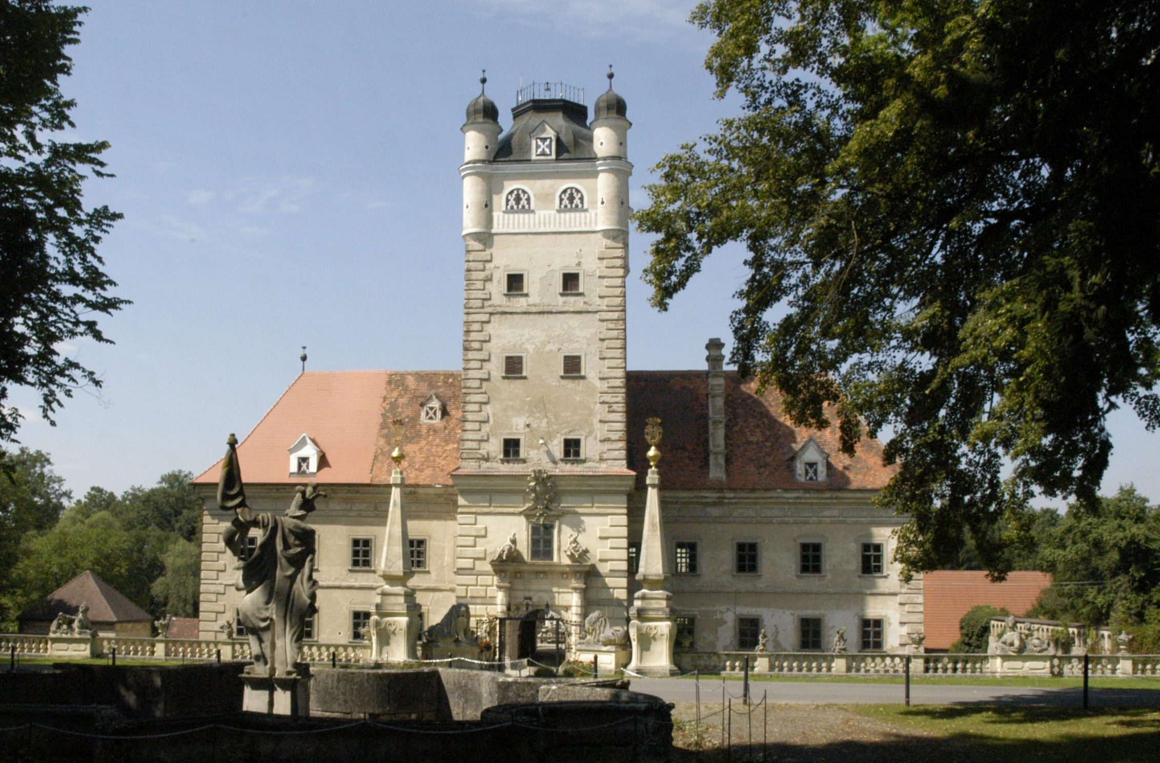 Schloss Greillenstein, Gemeinde Röhrenbach